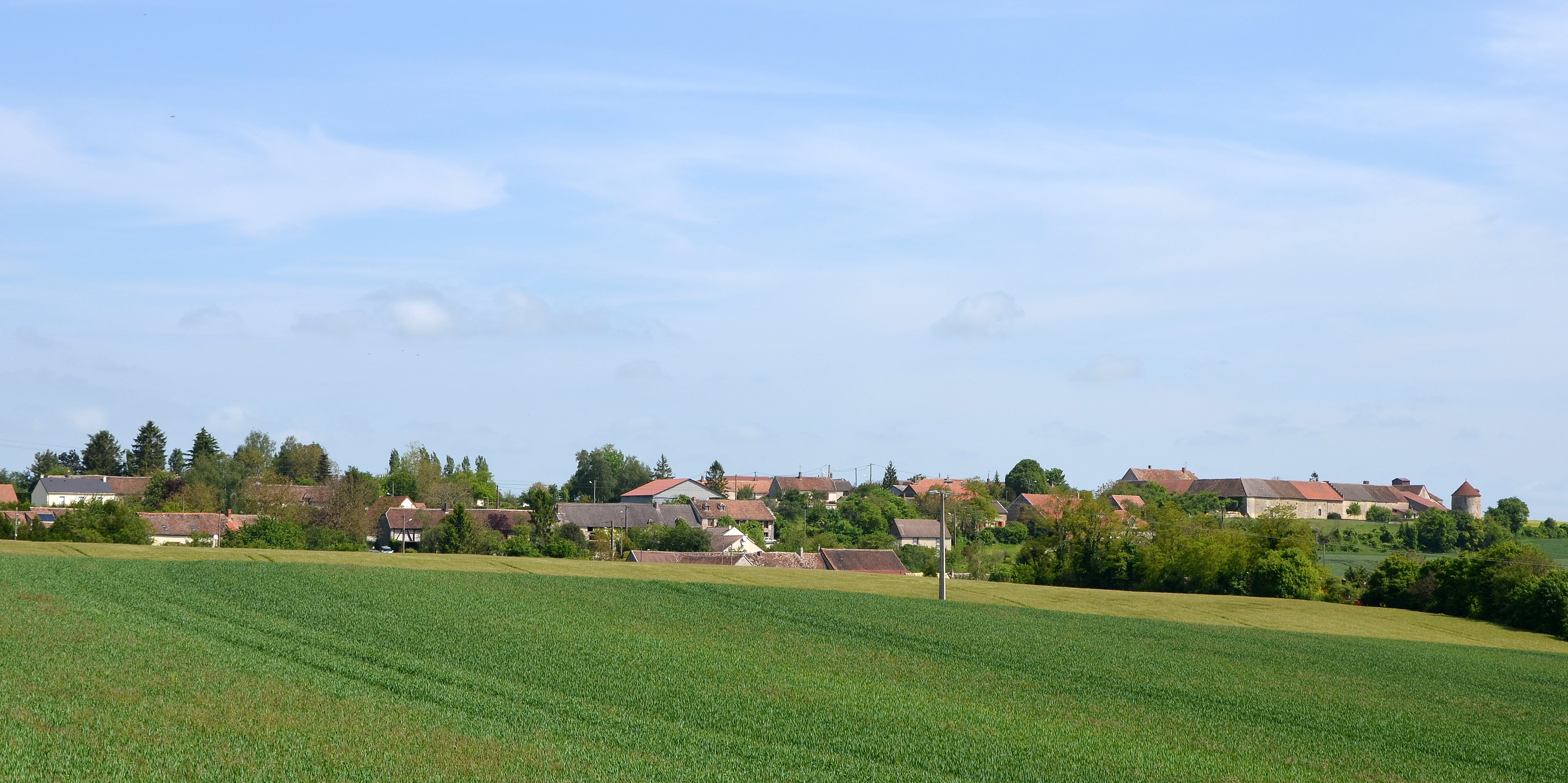 Hameau de Courtioux, La Saulsotte, France